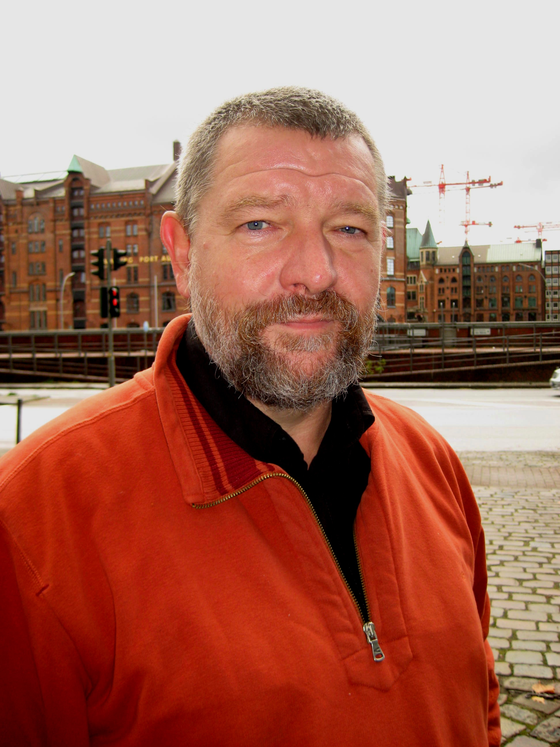 Der deutsche Schriftsteller Udo Scheer (* 1951) am 4.Oktober in Hamburg vor der Kulisse der Speicherstadt. Anlass seines Besuchs waren die Feierlichkeiten zum Tag der Deutschen Einheit und seine Lesung aus seinem Buch "Jürgen Fuchs - Ein literarischer Weg in die Opposition" in der Hamburger Hauptkirche St. Katharinen, einer Veranstaltung der Kirchengemeinde und des Literarischen Hafenclubs e. V.